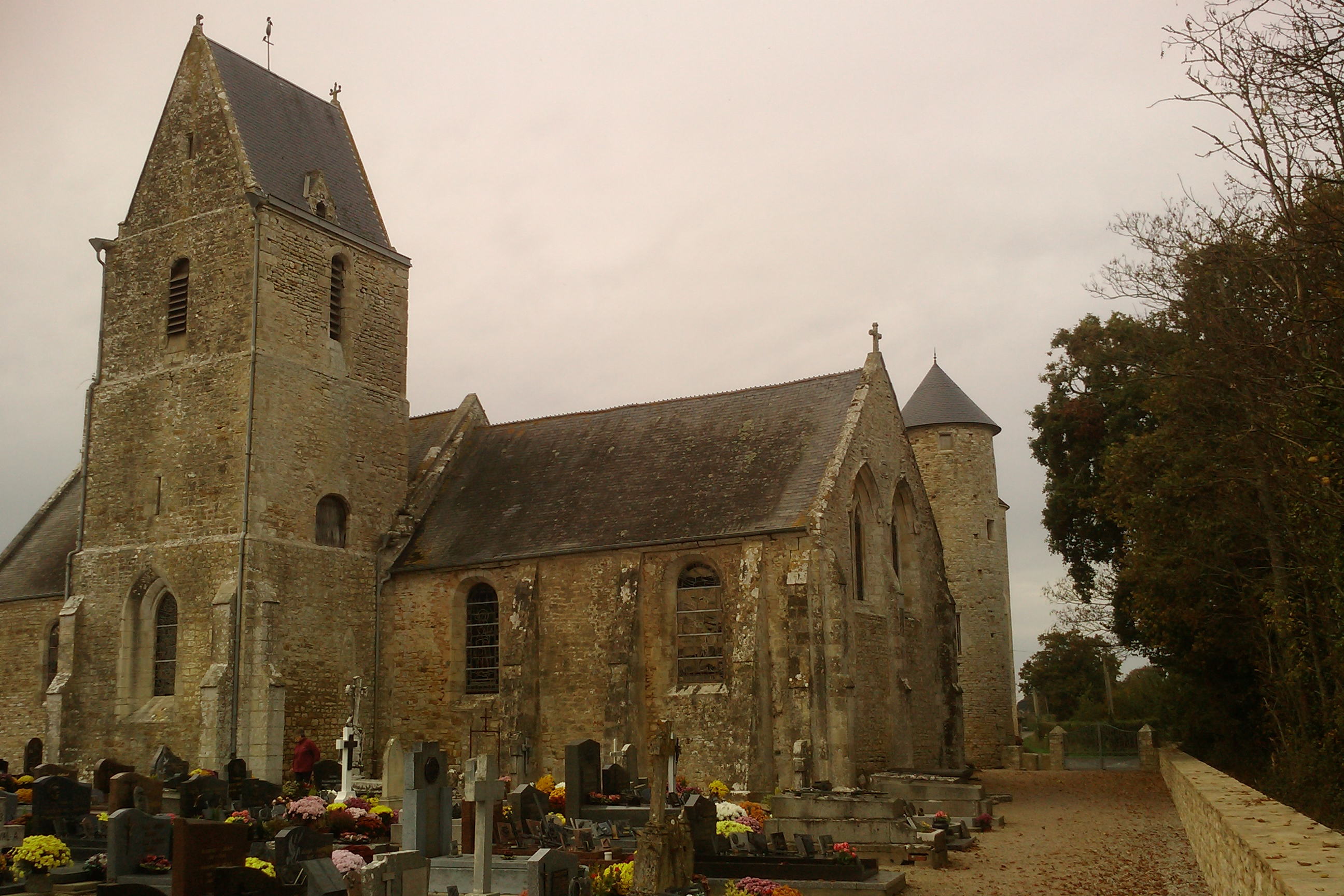 Église Saint-Georges d'Étienville (13e siècle ; 14e siècle ; 18e siècle)